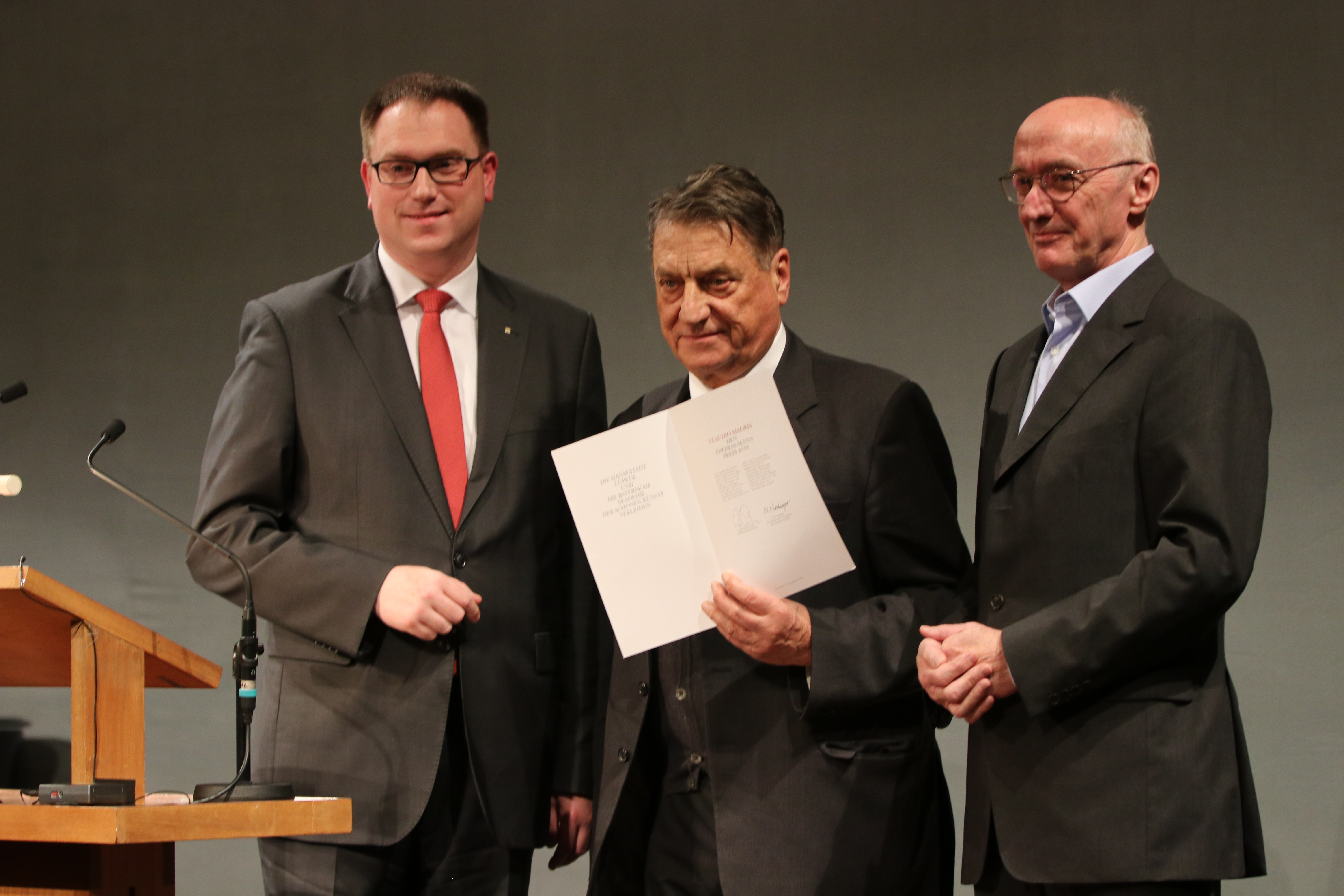 Der Thomas-Mann-Preis 2019 an Claudio Magris (Mitte) wurde in der Bayerischen Akademie der Schönen Künste von Jan Lindau, Bürgermeister der Hansestadt Lübeck, (links) und Winfried Nerdinger, Präsident der Akademie (rechts) verliehen.